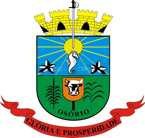 Brasão do município de Osório, Rio Grande do Sul, Brasil.